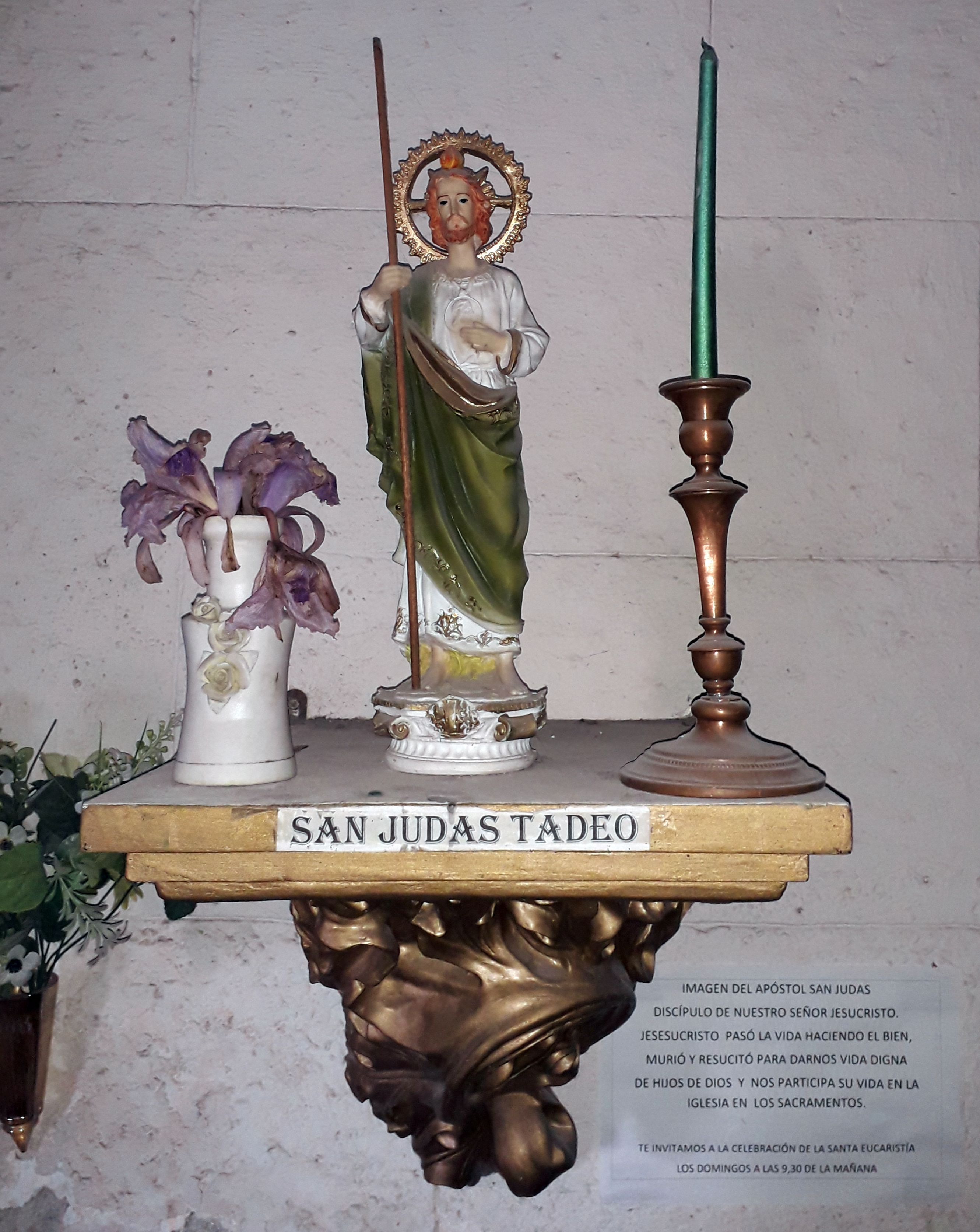 Imagen de San Judas Tadeo, Apóstol de Jesucristo, de la Parroquia de San José de Jatibonico y Arroyo Blanco en Cuba.